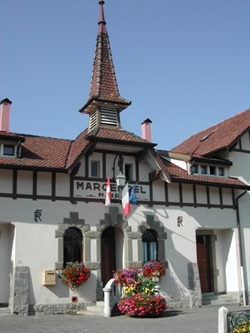 Mairie de Margencel (Haute-Savoie)